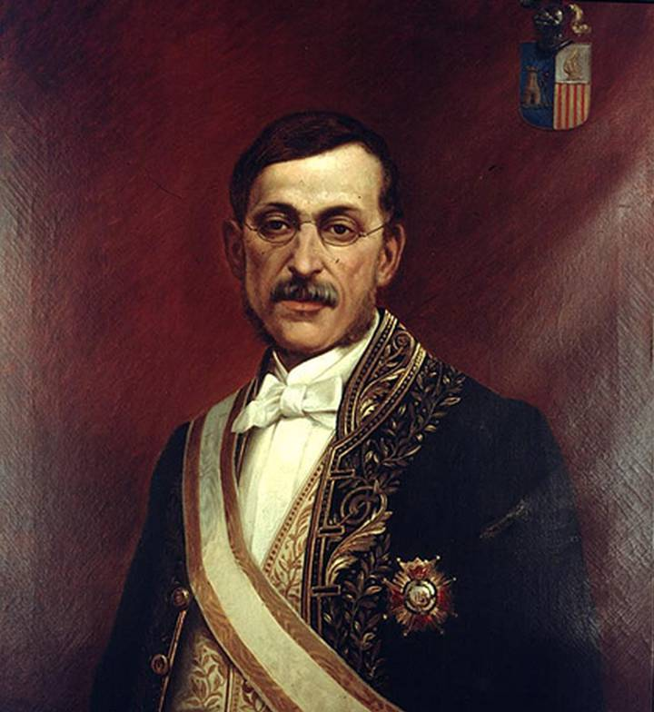 Tomás Moragas: Retrato de Sinibaldo de Mas